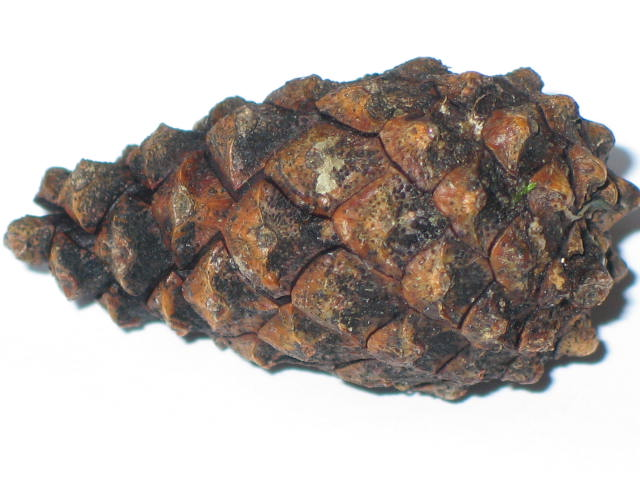 geschlossener alter Kiefernzapfen, der über Nacht in Wasser lag.